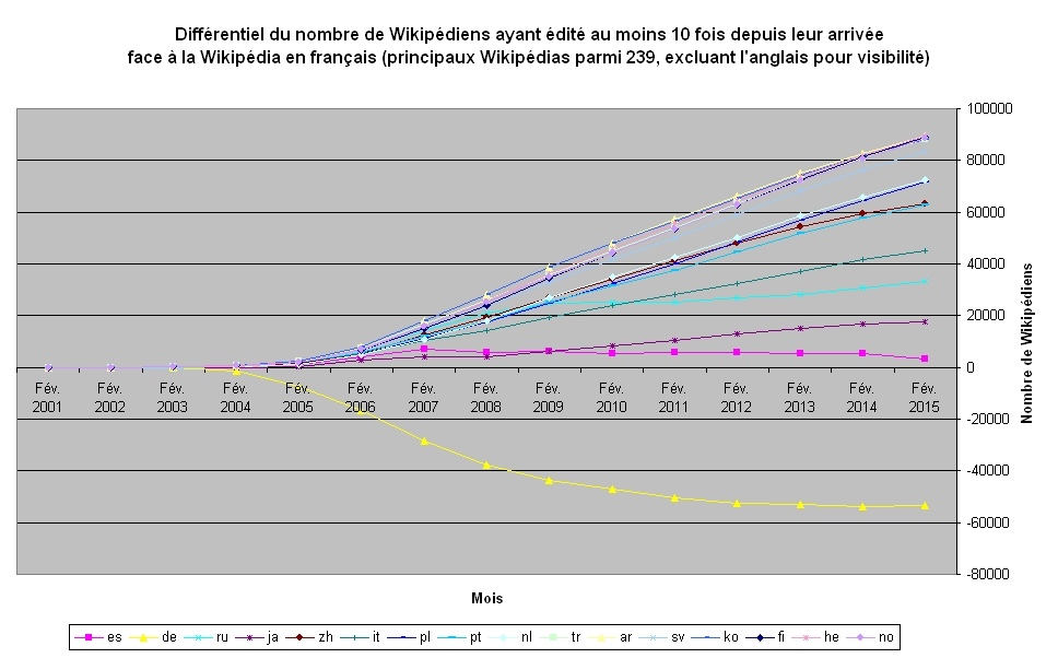 Différentiel du nombre de Wikipédiens ayant édité au moins 10 fois depuis leur arrivée entre la Wikipédia en français et les autres Wikipédias. Seuls les principaux Wikipédias par ce critère sont affichés, à l'exclusion de l'anglais pour plus de visibilité.